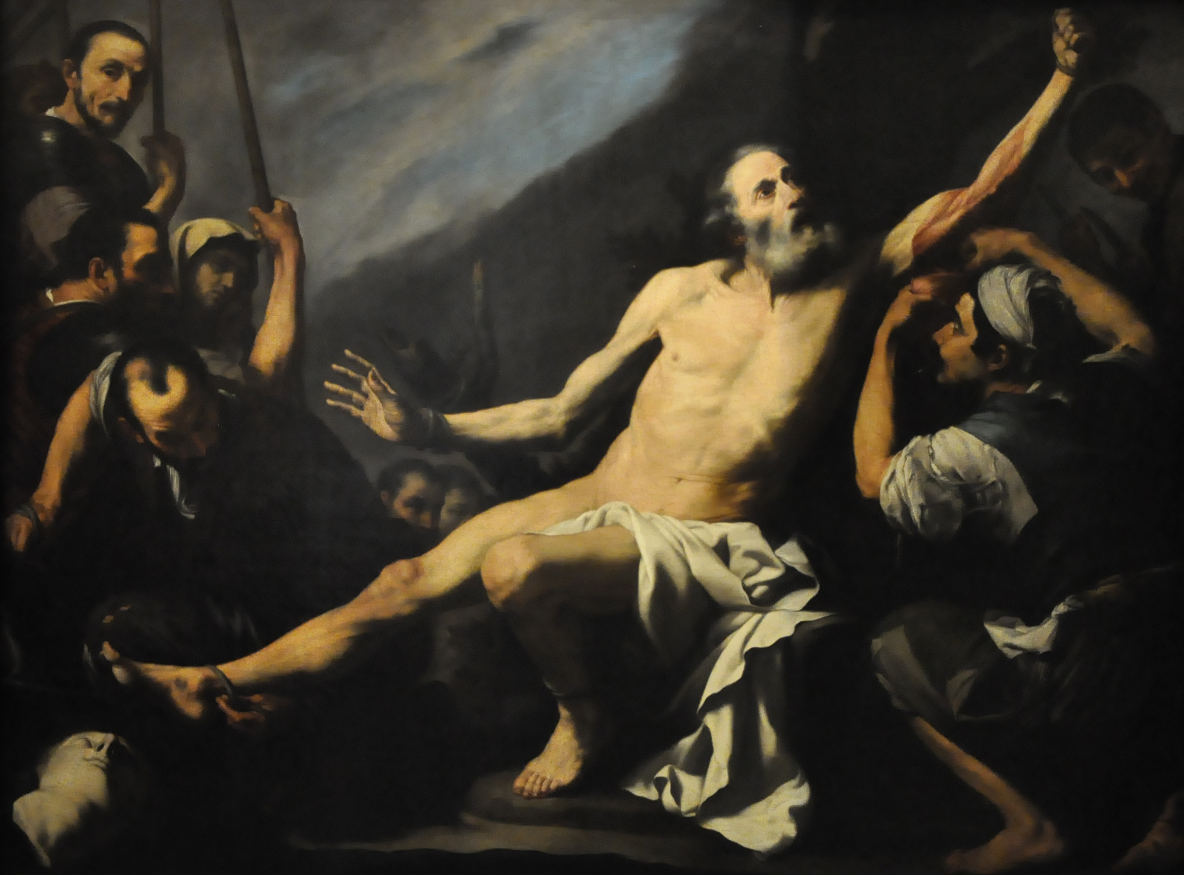 El lienzo representa el martirio de San Bartolomé, uno de los Doce Apóstoles, que según la tradición murió desollado vivo en Armenia. Esta obra es una copia del cuadro de José de Ribera conservado en el Museo de Arte Antiguo de Lisboa.